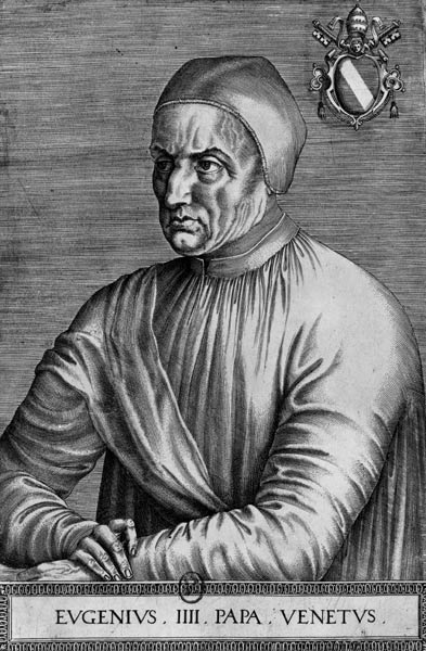 Portrait du pape Eugène IV. D'après Jean Fouquet Paris, BnF, Réserve des livres rares, Rés. H 81 (Gravure n° 8 du recueil d'Onofrio Panvinio, Onuphrii Panvinii Veronensis Fratris Eremitæ Augustiniani XXVII Pontificum maximorum Elogia et imagines accuratissime ad vivum æneis typis delineatæ, Rome, 1568)